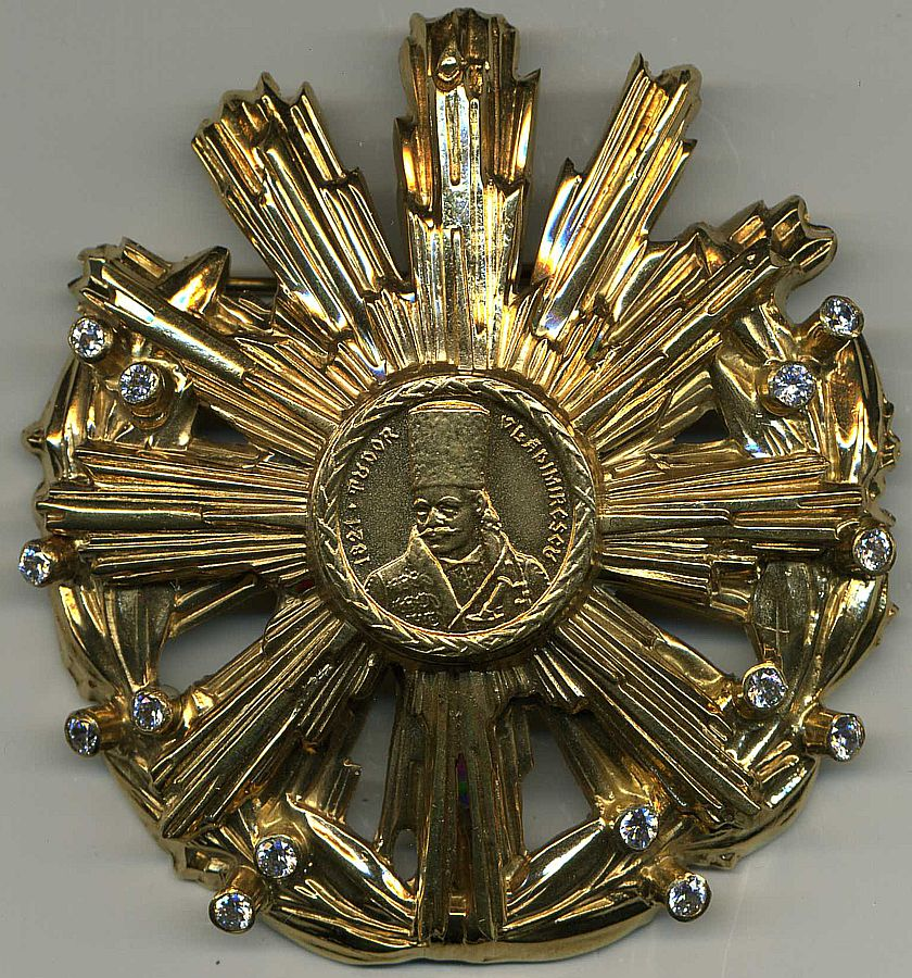 Орден Тудора Владимиреску 1 степени